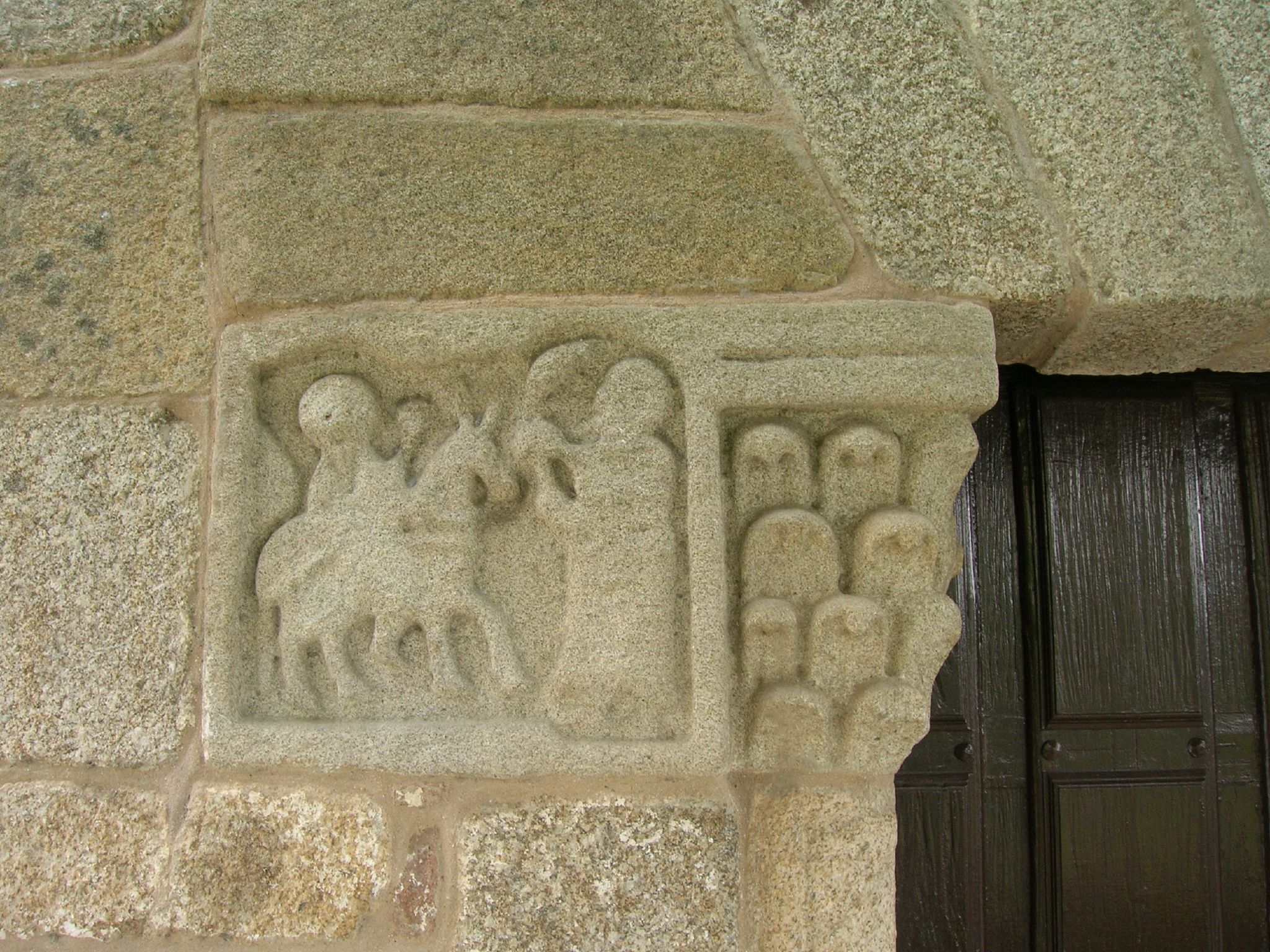 Detalle da Capela de San Xés de Francelos